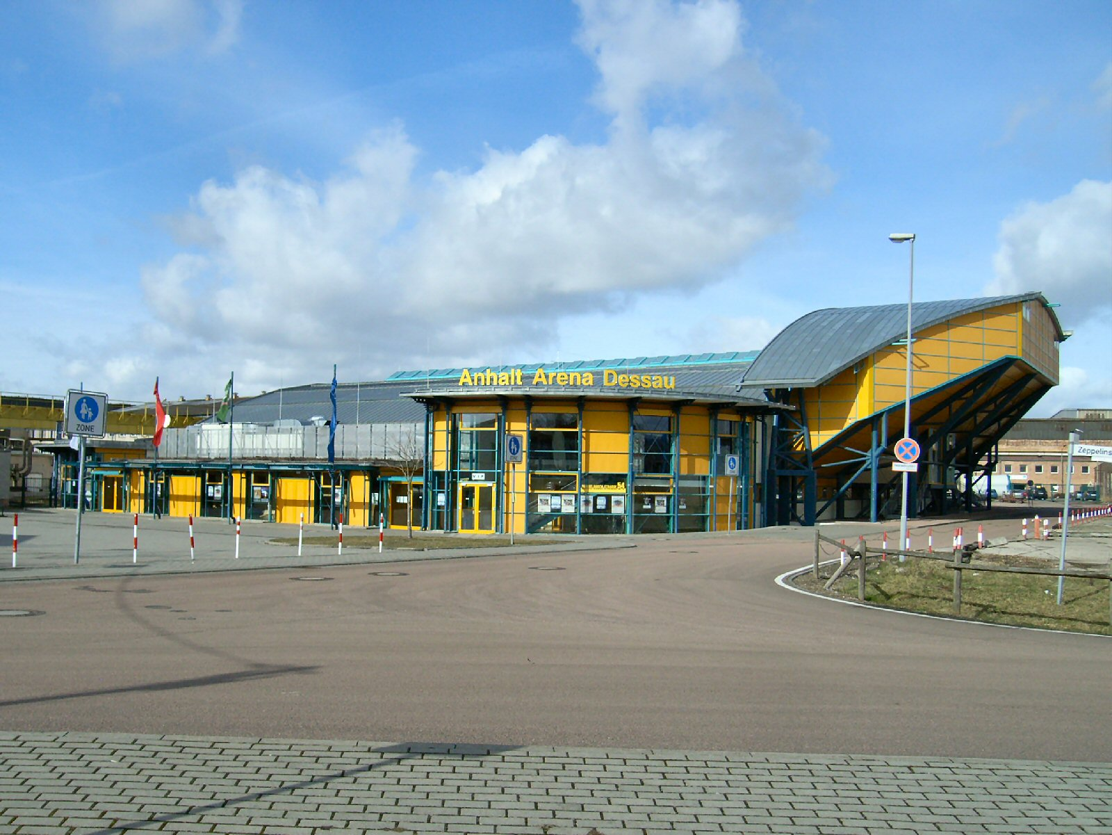 Anhalt Arena Dessau